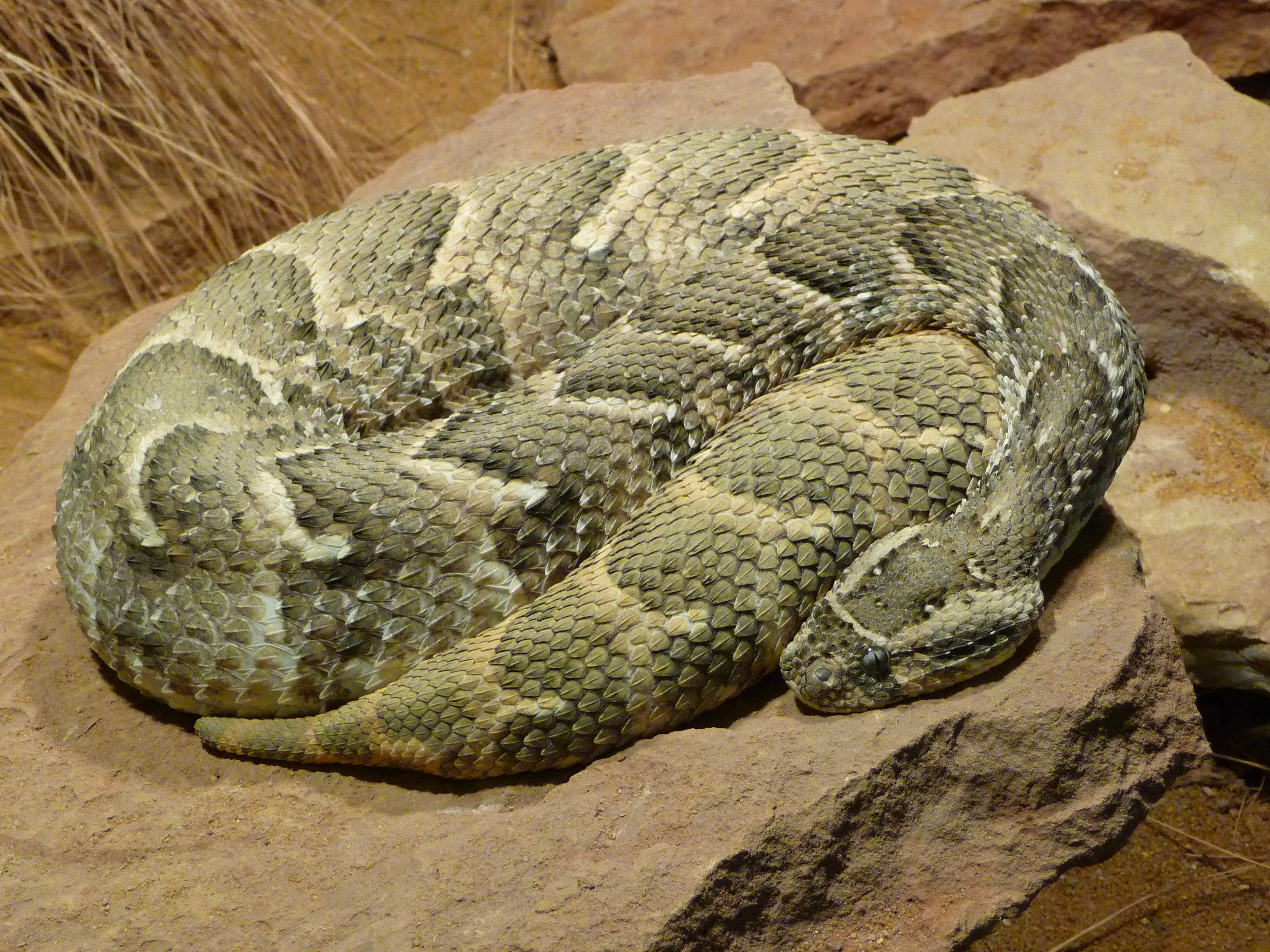 Puffotter (Bitis arietans) im Vivarium Darmstadt (Hessen, Deutschland)